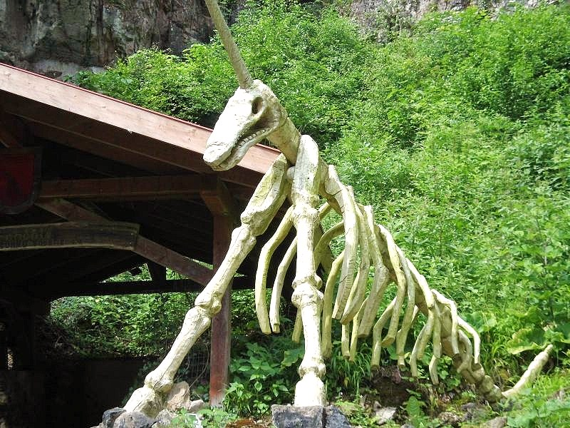 Modell eines Einhorns nach Zeichnung von Gottfried Wilhelm Leibniz, vor dem Eingang zur Einhornhöhle bei Scharzfeld, Harz